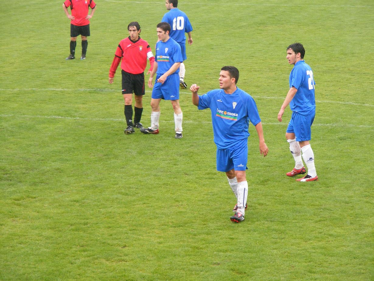 Partido CD Molinense contra el Base Abarán